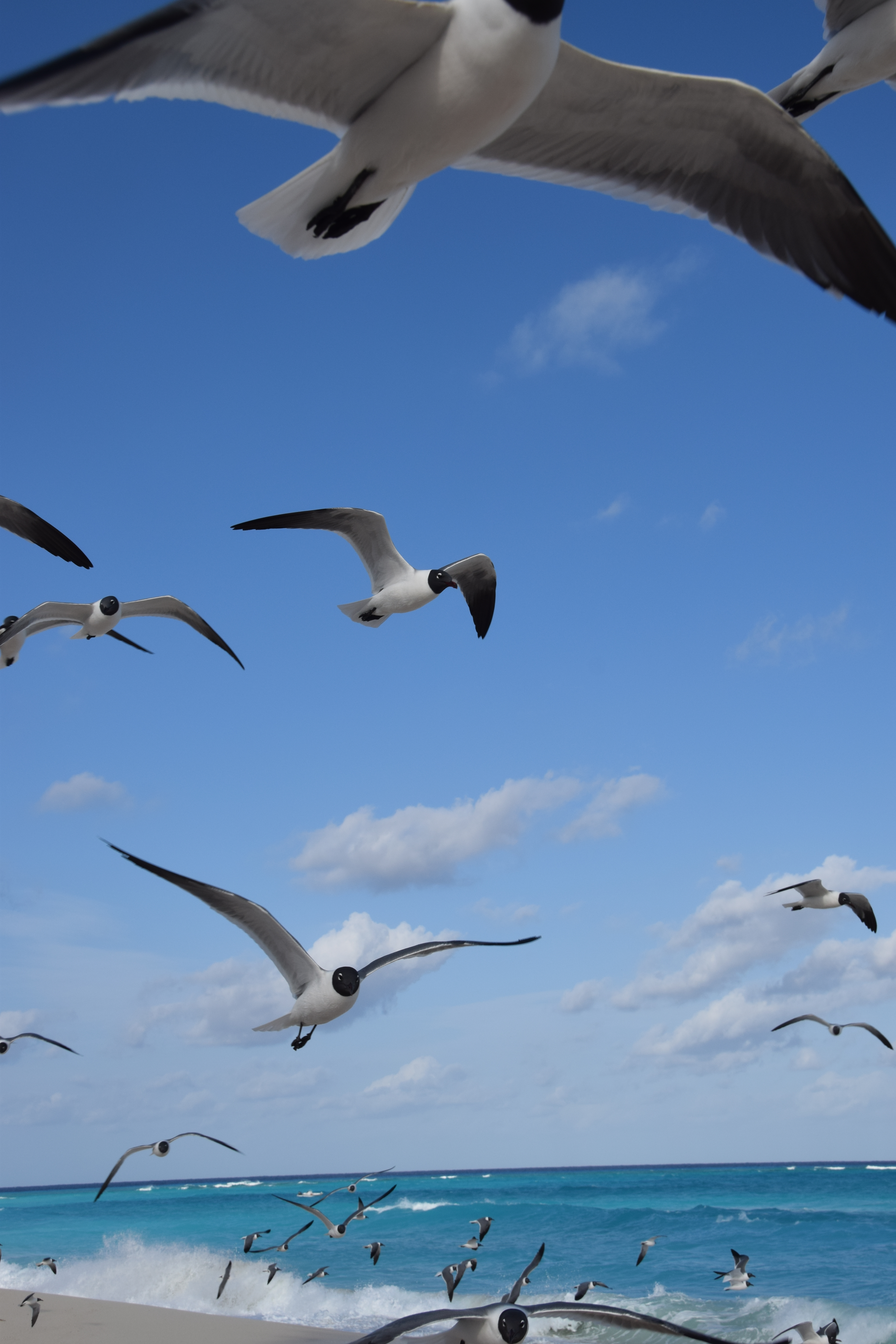 Mouettes atricille en vol (Mouettes rieuses d'Amérique)